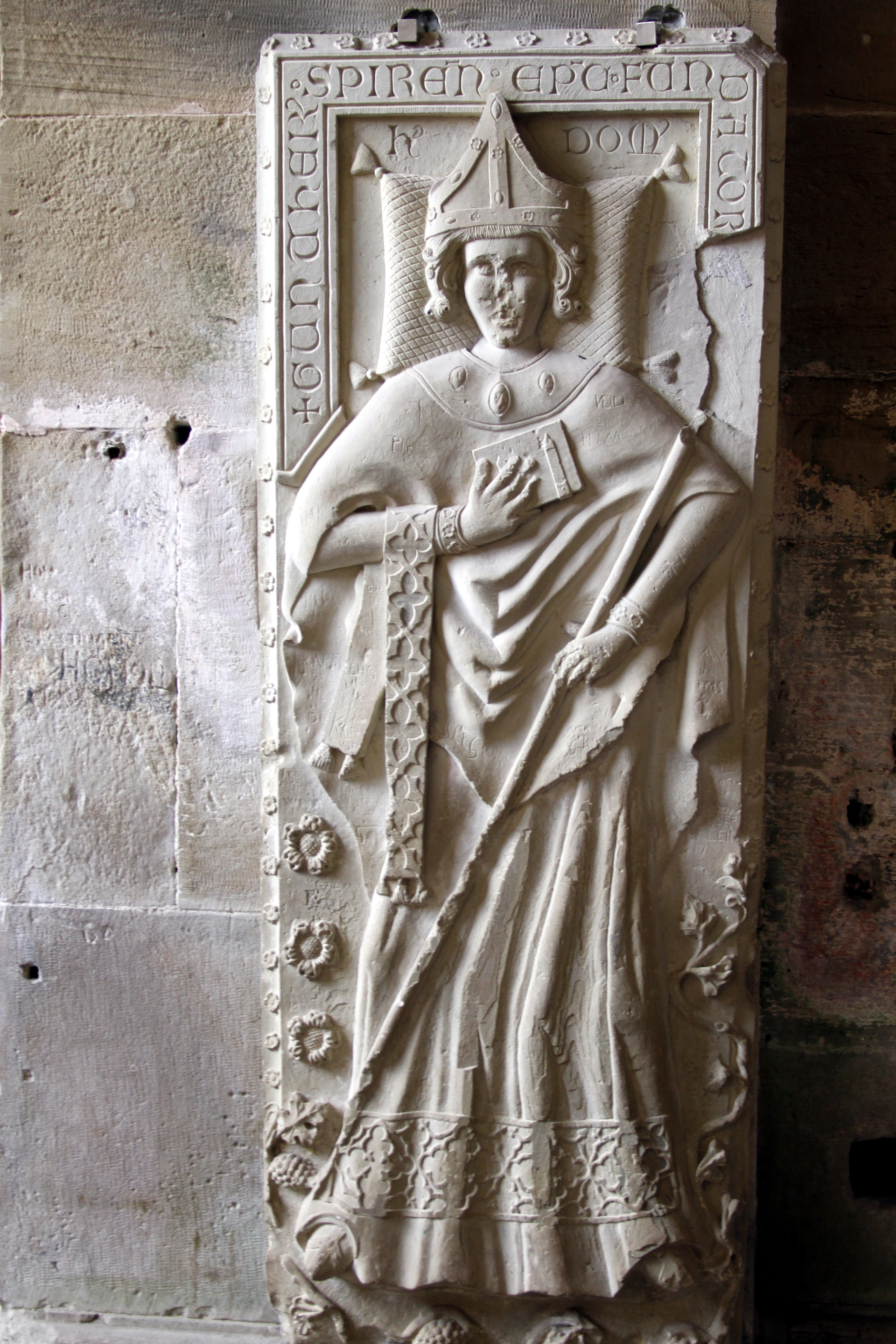 Maulbronn Monastery - Maulbronn - Germany